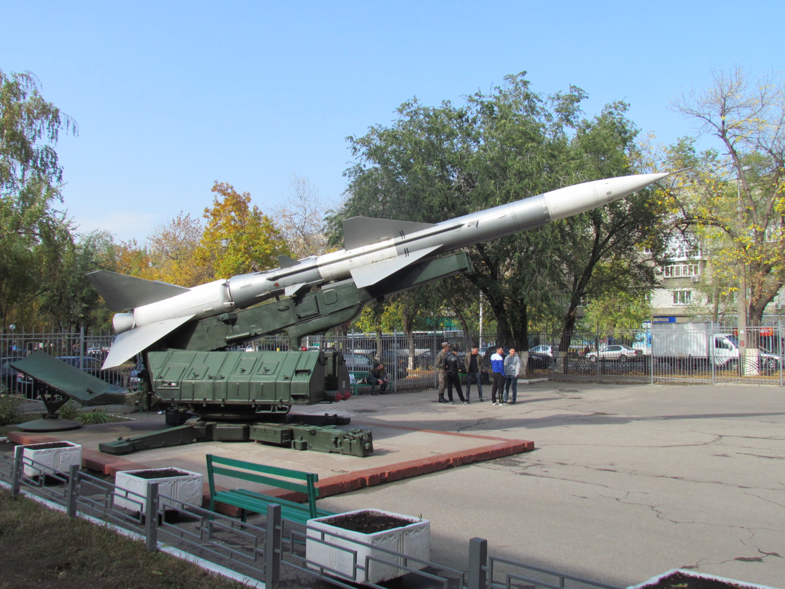 Пусковая установка С-75, установленный на проспекте Алтынсарина (Алма-Ата, Казахстан) около Военно-инженерного института радиоэлектроники и связи МО РК